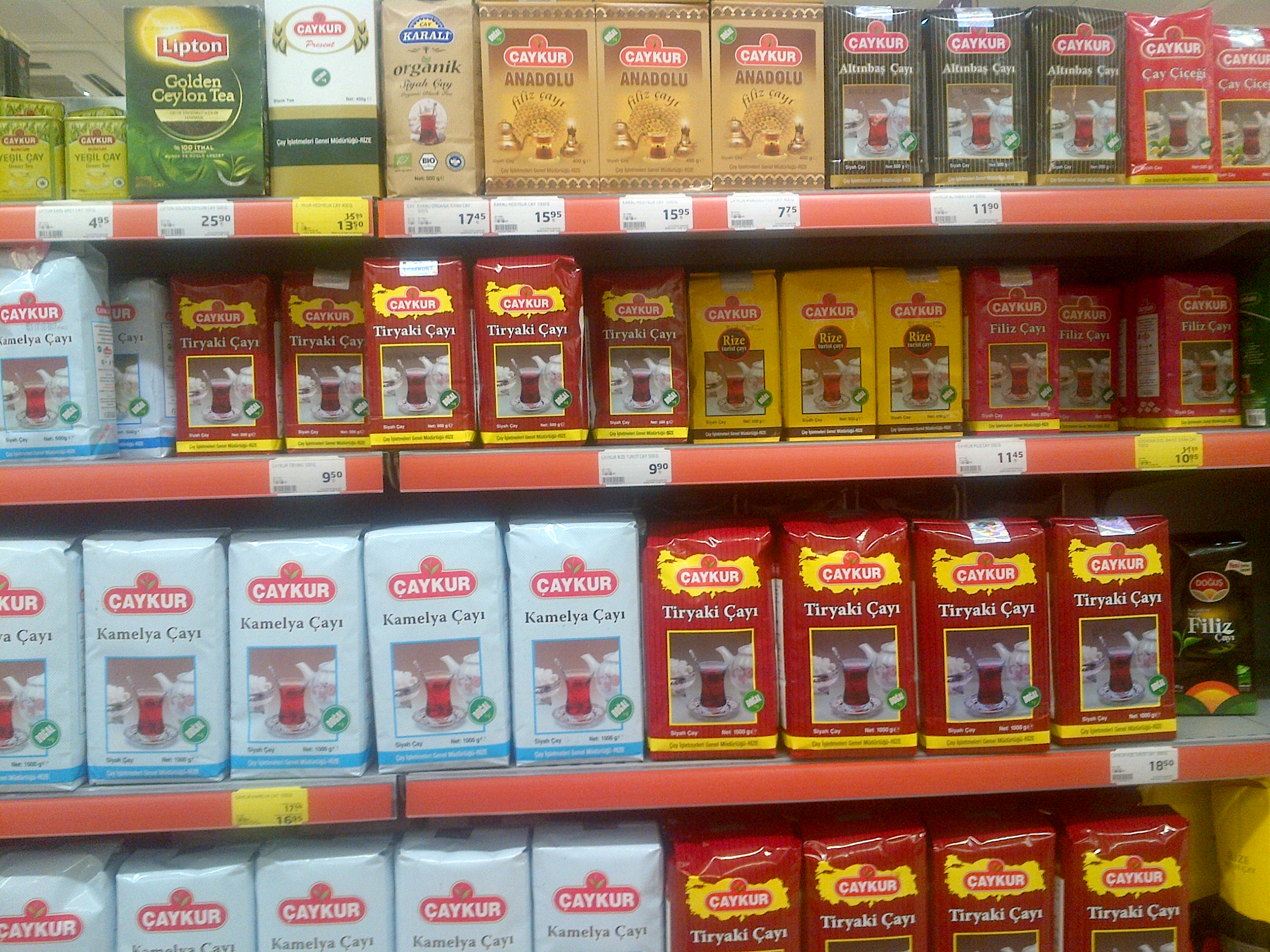 Paquetes de algunas variantes de te turco en la estanteria de un supermercado en Ankara.